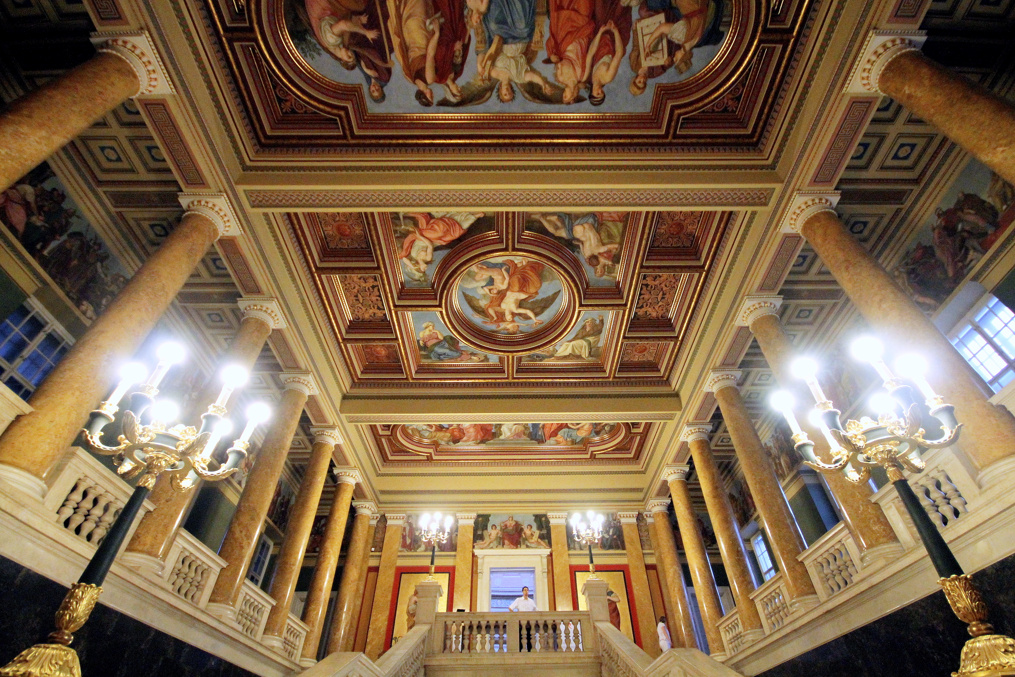 A MNM lépcsőháza